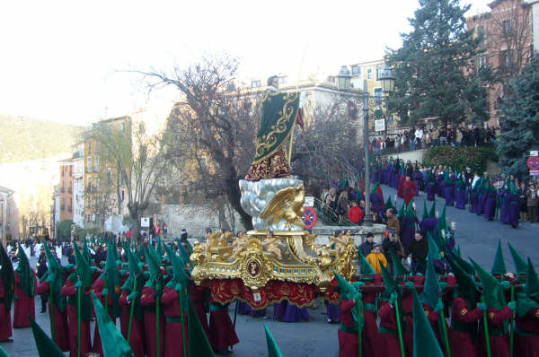 San Juan Apóstol Evangelista en la procesión Camino del Calvario de Cuenca.